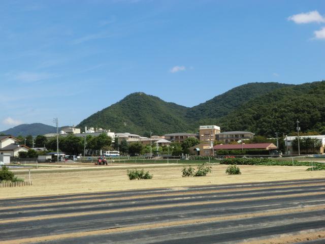 川崎学園の福祉施設、旭川荘の写真です。